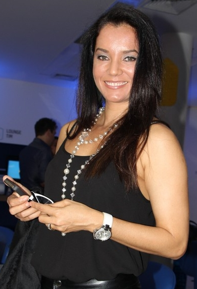 Mônica Carvalho na loja da TIM do Shopping Eldorado em São Paulo para o lançamento do novo Iphone 6.